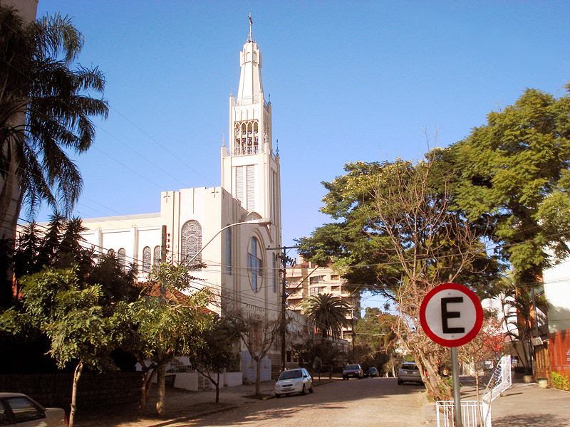 Rua Santa Cecília no bairro de mesmo nome, em Porto Alegre, Brasil. A igreja vista na foto, também dedicada a esta Santa, deu nome ao bairro